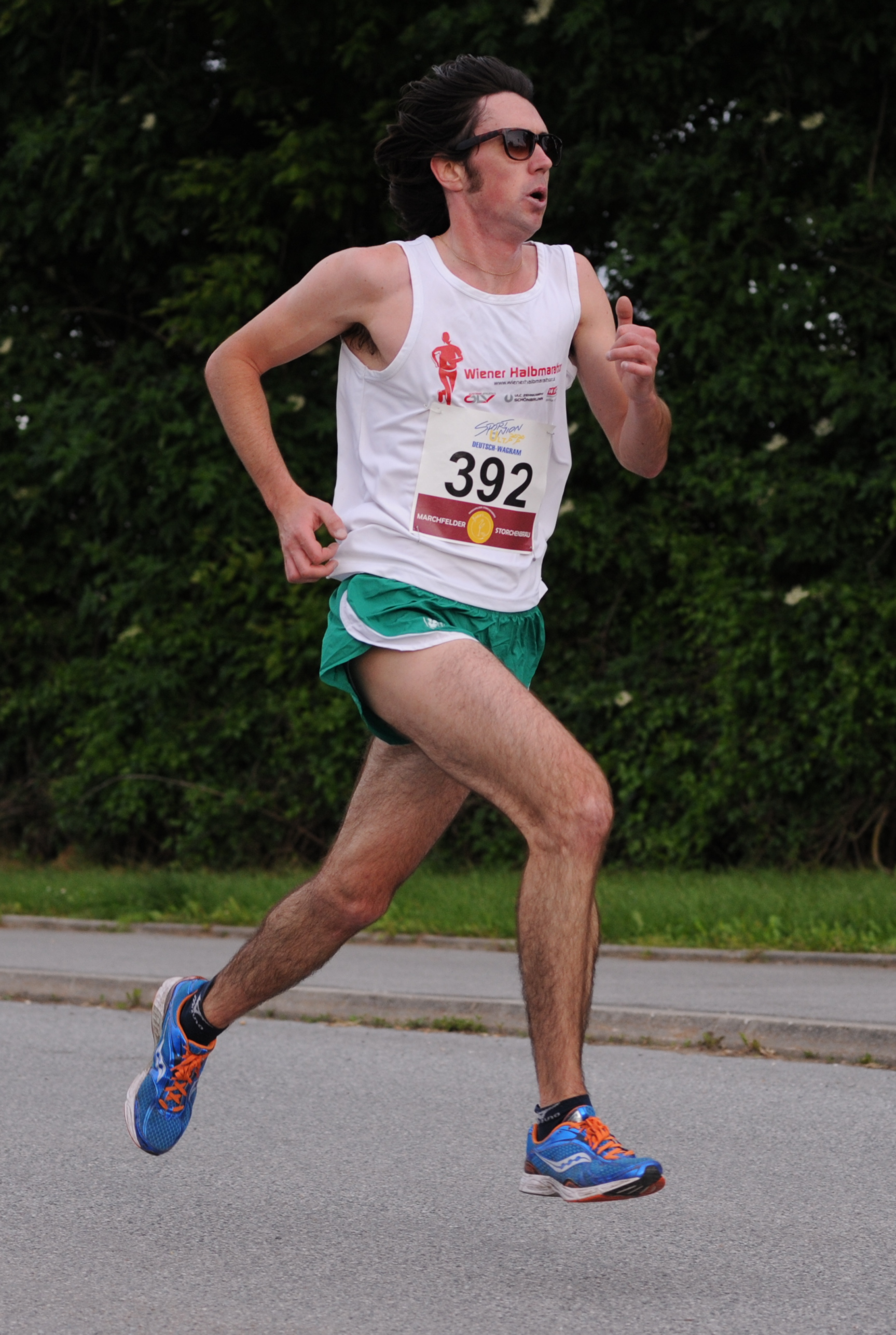 Der Ire Mick Clohisey, Sieger des Vienna-City-Marathon Halbmarathonbewerbs 2014 beim Straßenlauf in Deutsch Wagram am 1. Juni 2013